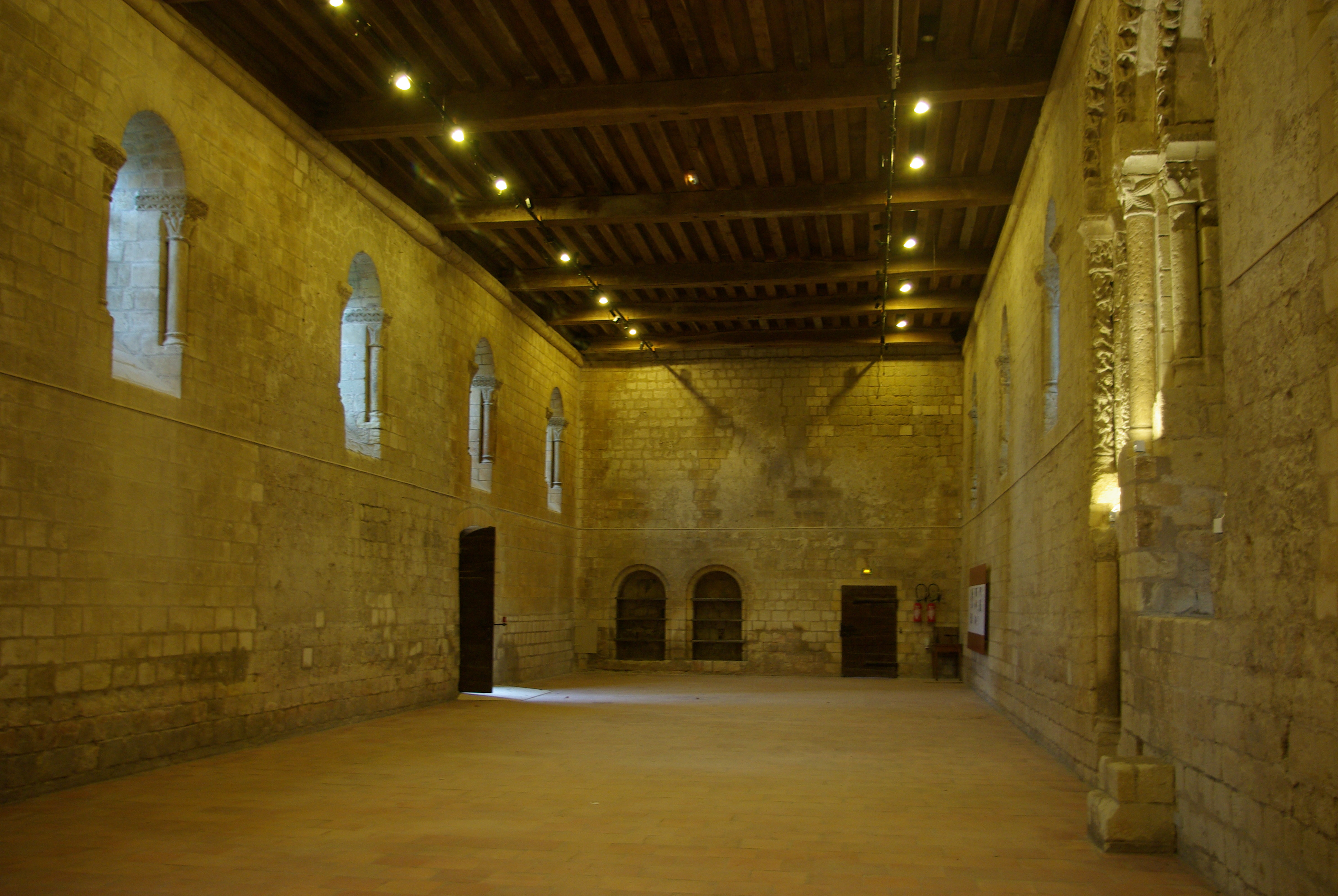 Prieuré de Saint-Cosme : Vue de l'intérieur du réfectoire (détruite en 1944 et restauré après guerre).